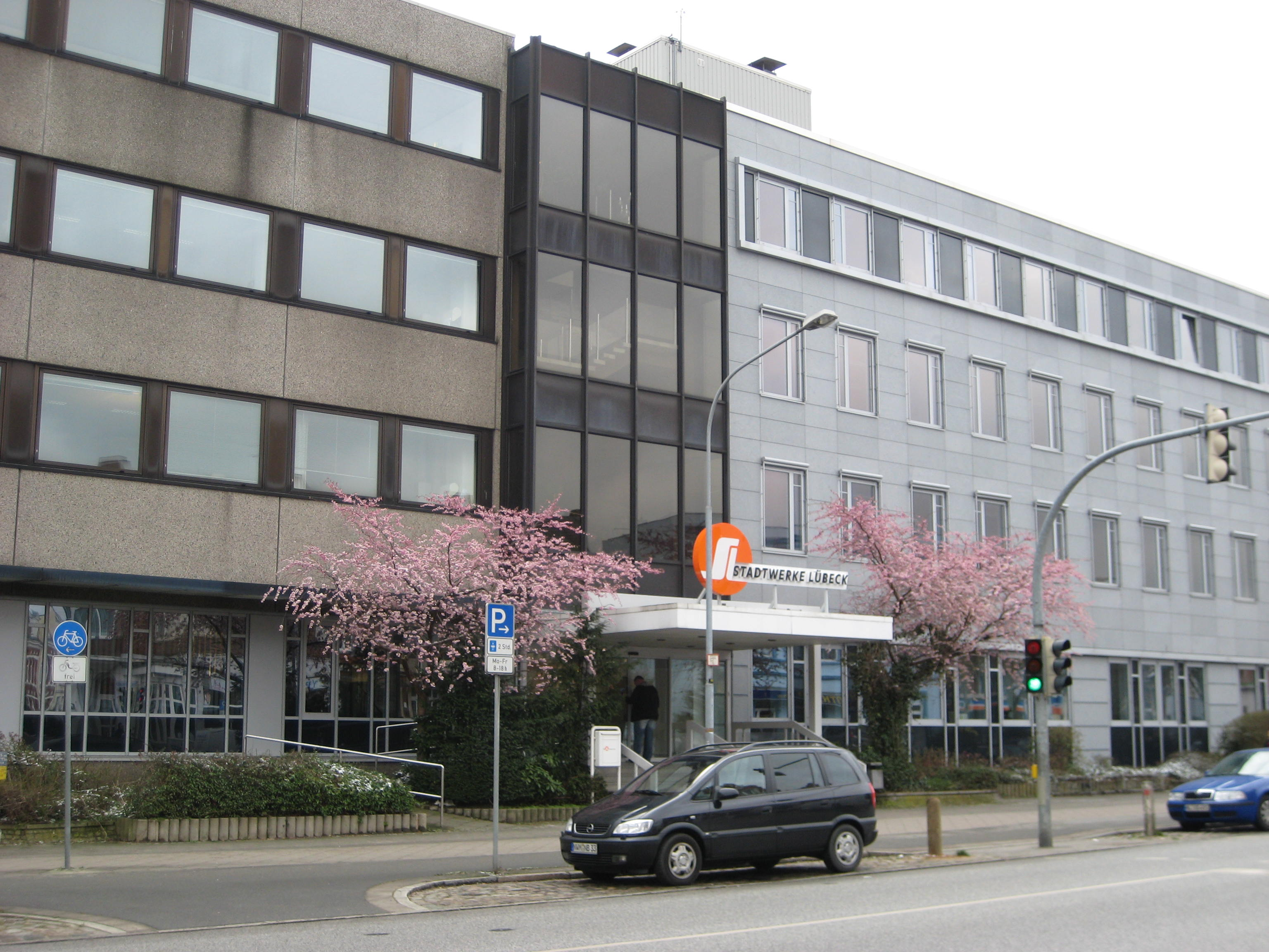 Stadtwerke Lübeck, Hauptsitz in der Moislinger Allee